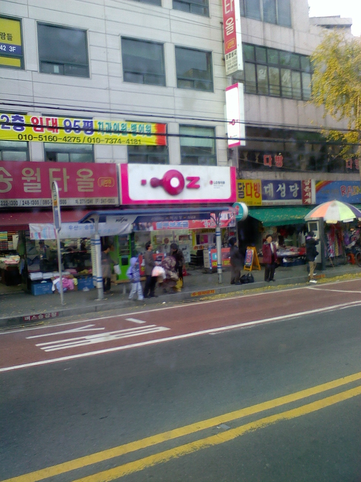 정류장 시설물 문제가 해결된 마산시 어시장 버스정류장, 마산시 어시장 지나던 대중교통 소속 53번 버스에서 촬영